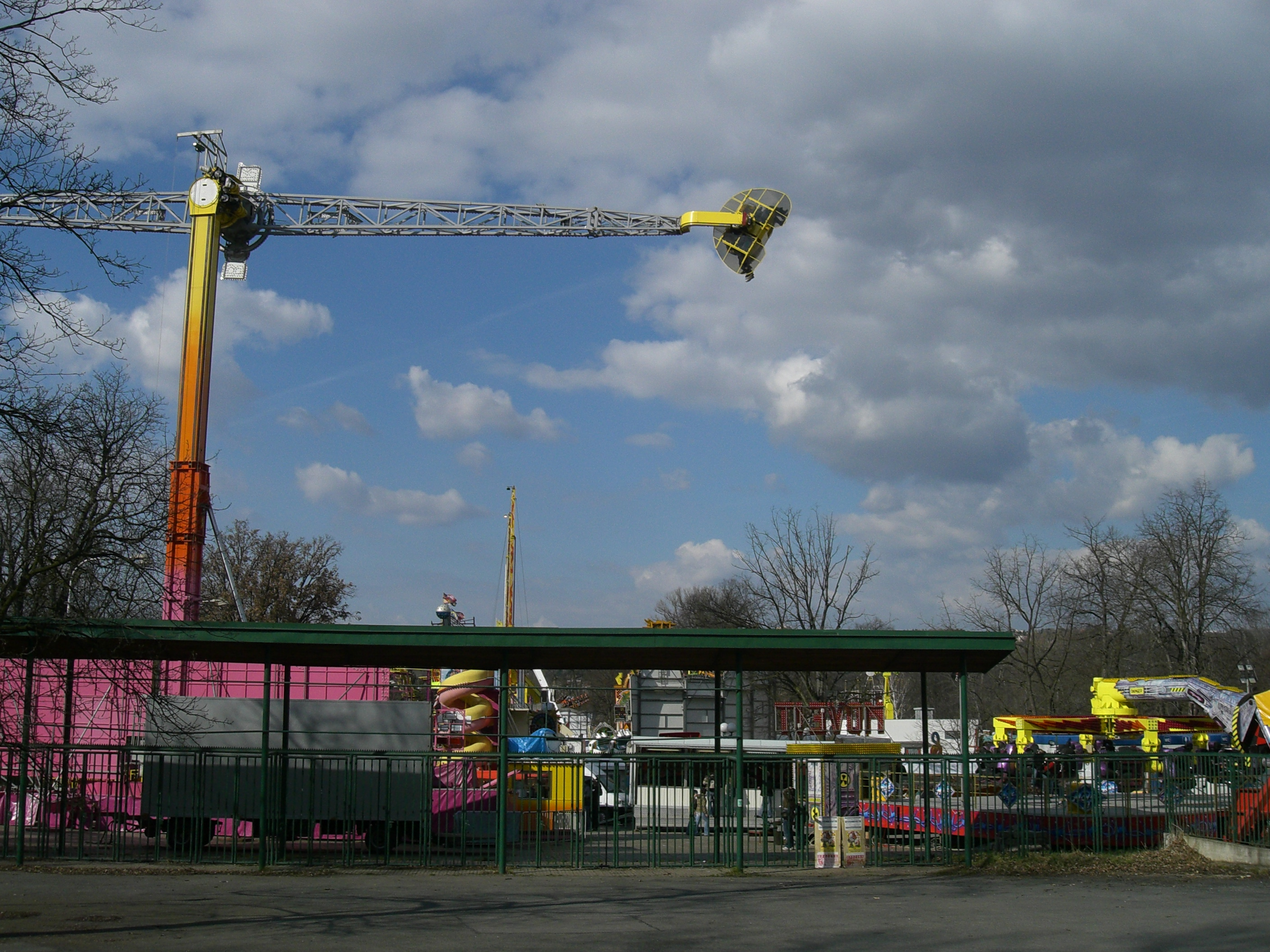 Matějská pouť